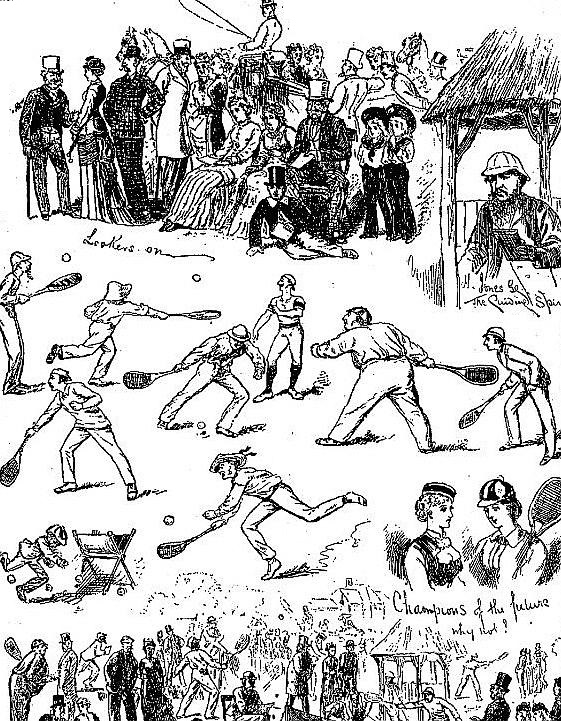 Le tournoi de Wimbledon en 1878.